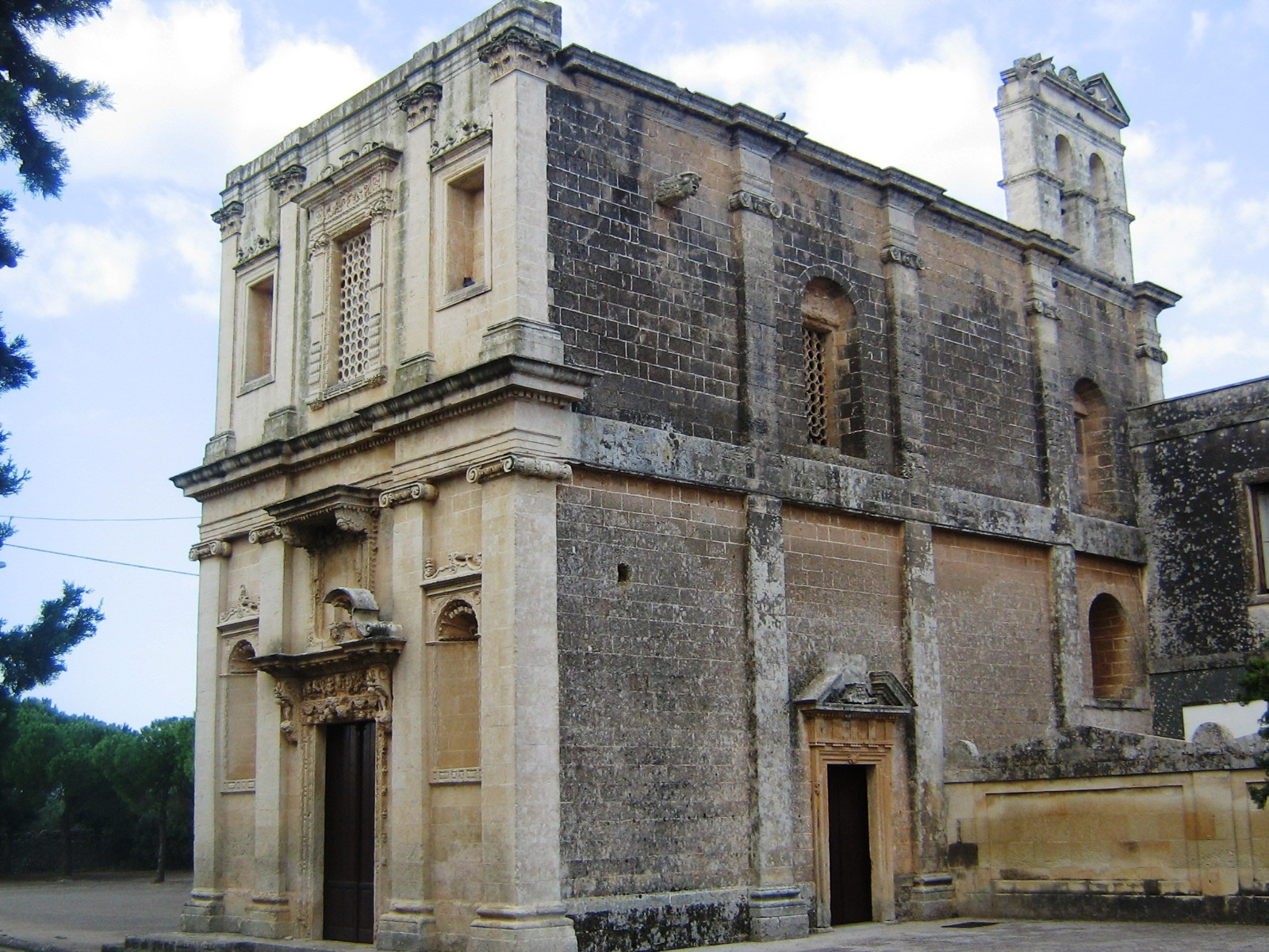 Chiesa Madonna delle Grazie Castri di Lecce